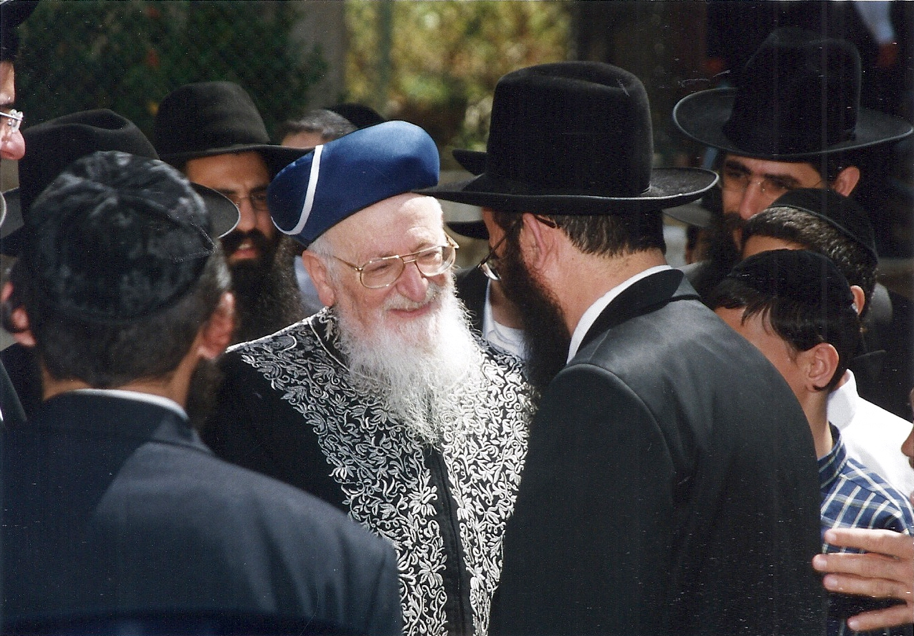 הרב נתן בוקובזה עם הרב מרדכי אליהו בישיבתו